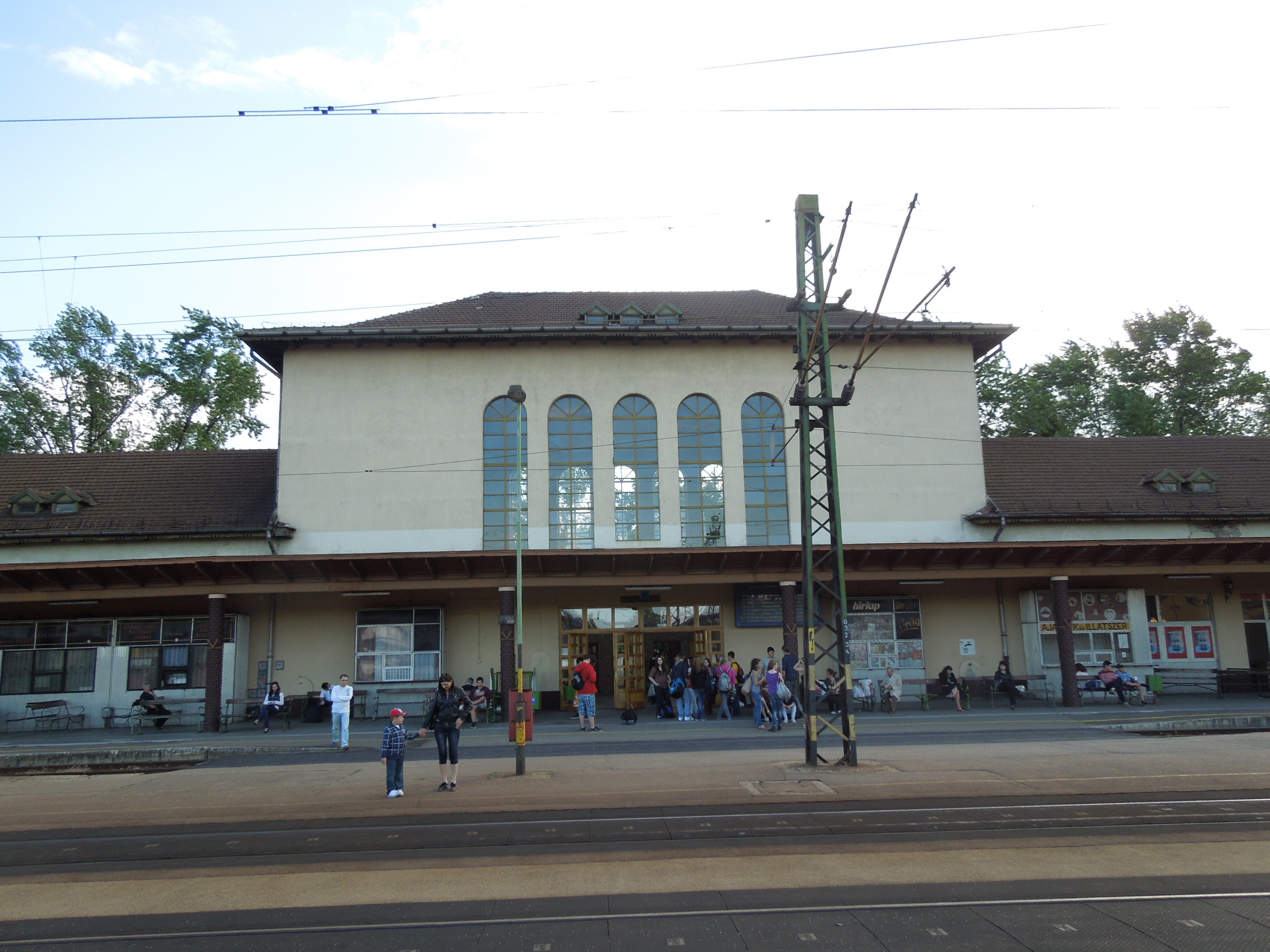 Kecskemét vasútállomása a vágányok felől fotózva